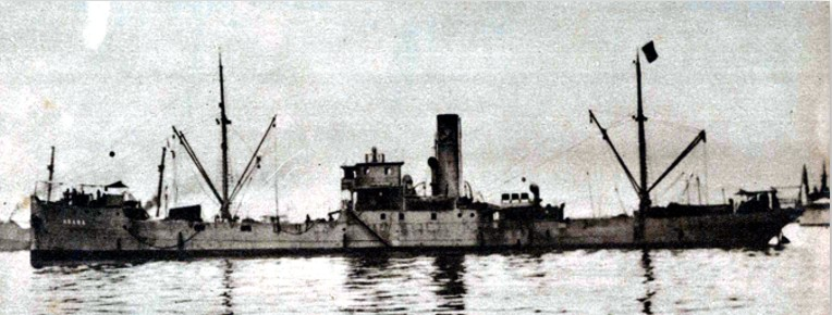 Foto, provavelmente tirada na década de 1930, do navio cargueiro Arará, o qual foi afundado em 17 de agosto de 1942, no litoral da Bahia, Brasil, pelo submarino alemão U-507.